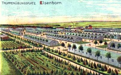 Gesamtansicht des Lager Elsenborn in der Gemeinde Bütgenbach in der Deutschsprachigen Gemeinschaft Belgiens